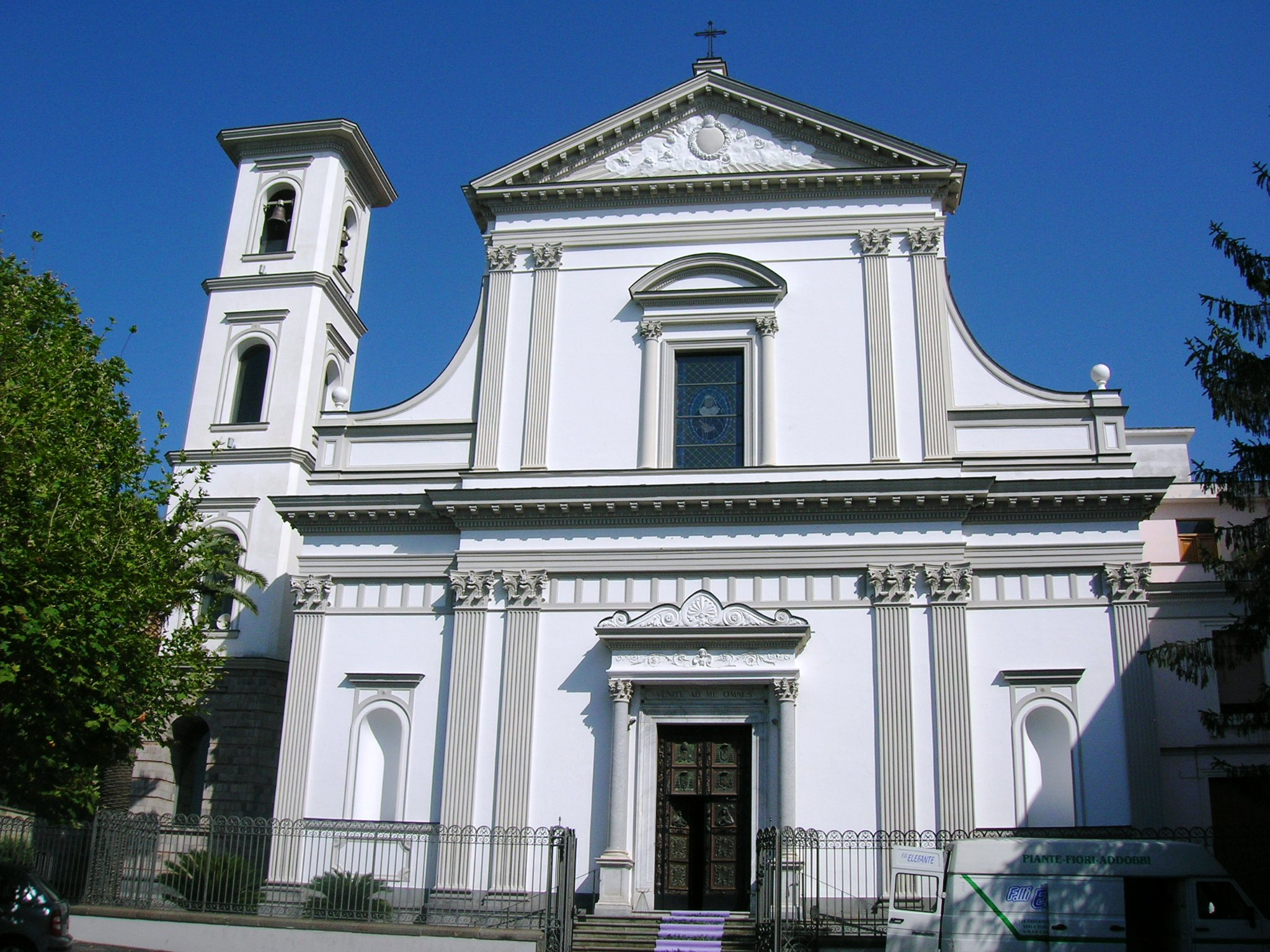 La facciata esterna del santuario del Sacro Cuore a Castellammare di Stabia